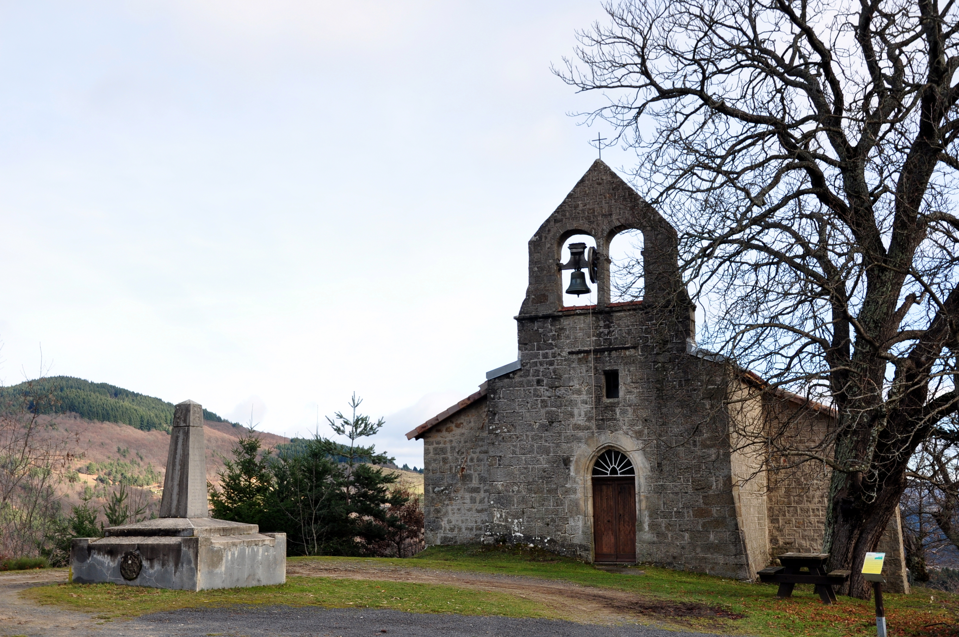 Eglise Saint-Pierre de Jaunac. Devant l'église, une pancarte donne les informations suivantes : « Altitude 645 mètres. Construite en pierres de pays, sa façade principale est rehaussée d'un clocher à peigne. Le bâtiment est un rectangle formé d'une nef centrale et de trois chapelles, dont deux sur le côté gauche. Ses chapelles et le Chœur sont éclairés par un vitrail. Des peintures du XIXème siècle de style baroque : fleurs de lys, étoiles, couvrent le chœur et les chapelles. Pendant les guerres de religion, l'église a subi de sérieux dommages. Jusqu'à la Révolution elle est désservie par un prieur-curé. A l'époque la nécessité d'avoir des armes amène à fondre la plupart des cloches des églises. Parfois, on laisse une cloche pour donner l'alarme en cas de nécessité. Les ancines racontent qu'elle aurait été construite à mi-chemin entre les habitants du haut des fermes isolées de Brion et des habitants du bas des hameaux. Une chapelle de l'église était dédiée à Notre Dame de la Pitéi, dont le vocable a été transféré à la chapelle érigée dans le village au "Petit-Lieu". Pour la visite, s'adresser au village. »